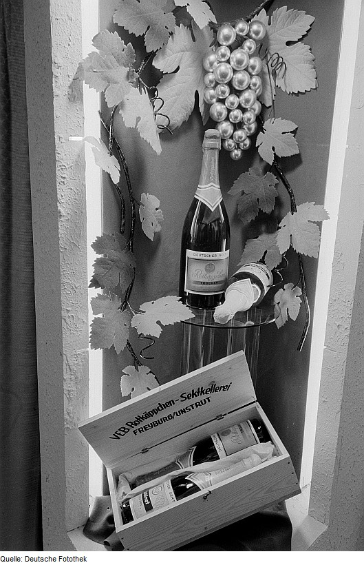 Original image description from the Deutsche Fotothek Stand des VEB Rotkäppchen-Sektkellerei Freyburg (Unstrut) auf der Herbstmesse 1953